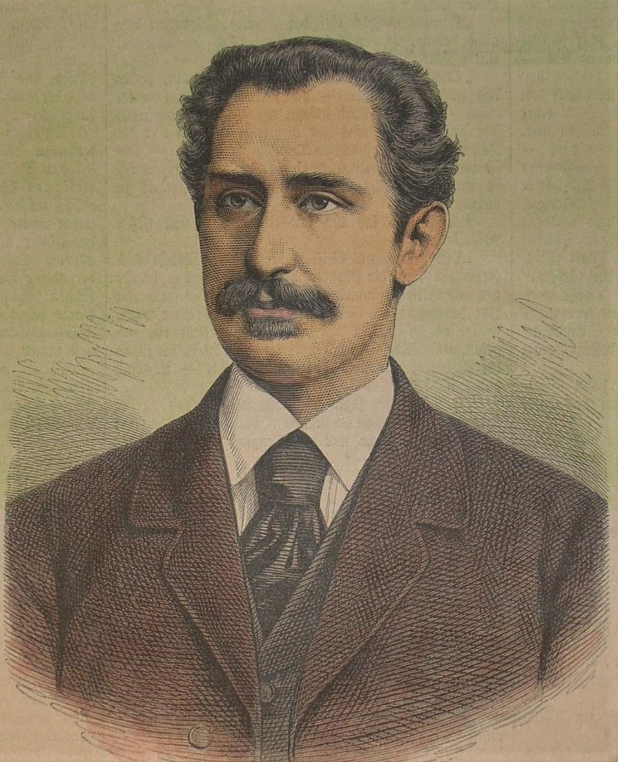 Hugo Lubliner (Hugo Bürger) , 1879, teilkolorierter Holzstich, ca. 15 x 12 cm